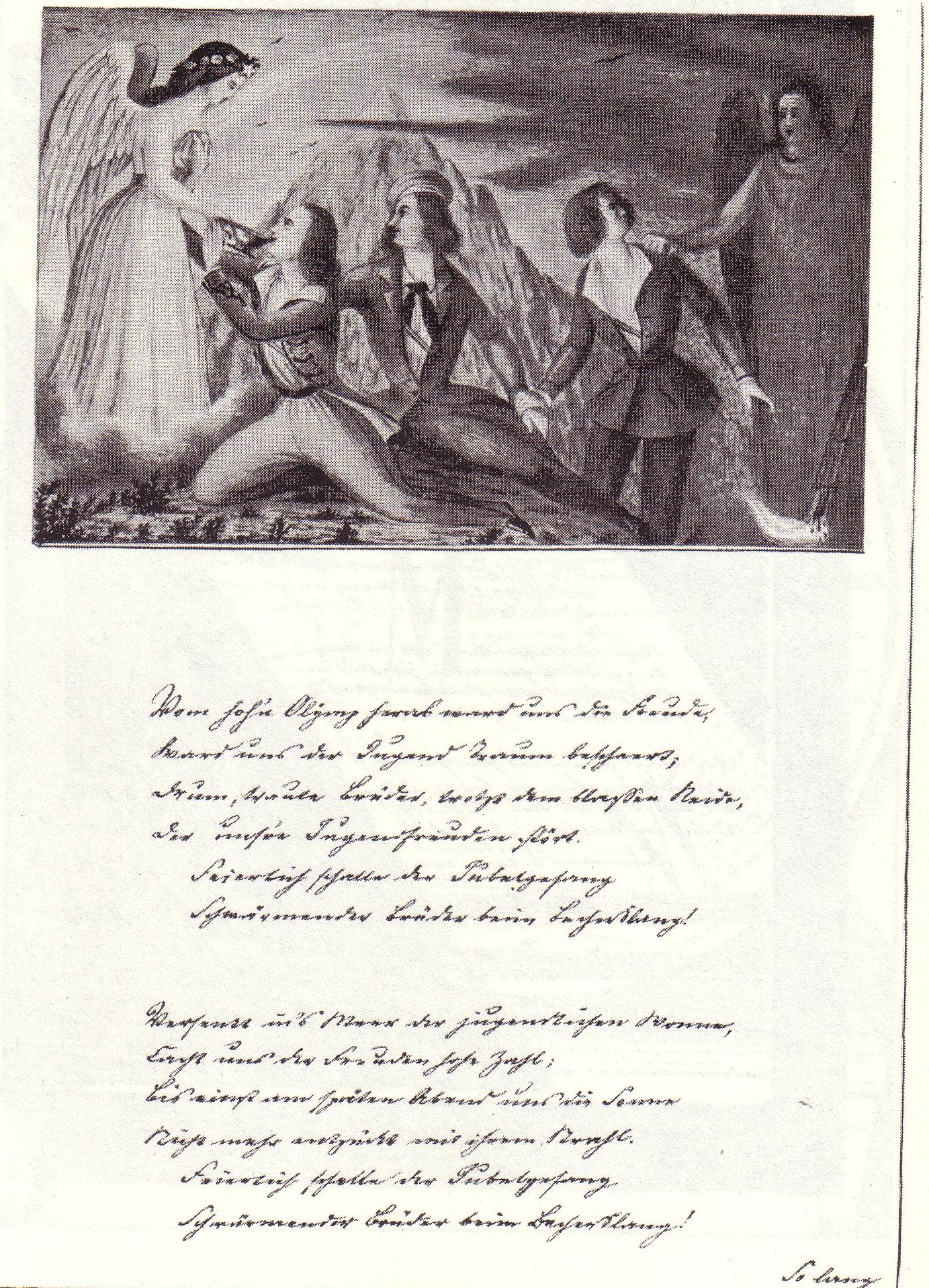 Trauerlied "Vom hoh´n Olymp herab" aus dem "Liederbuch der Albertina", Königsberg in Preußen, 1850